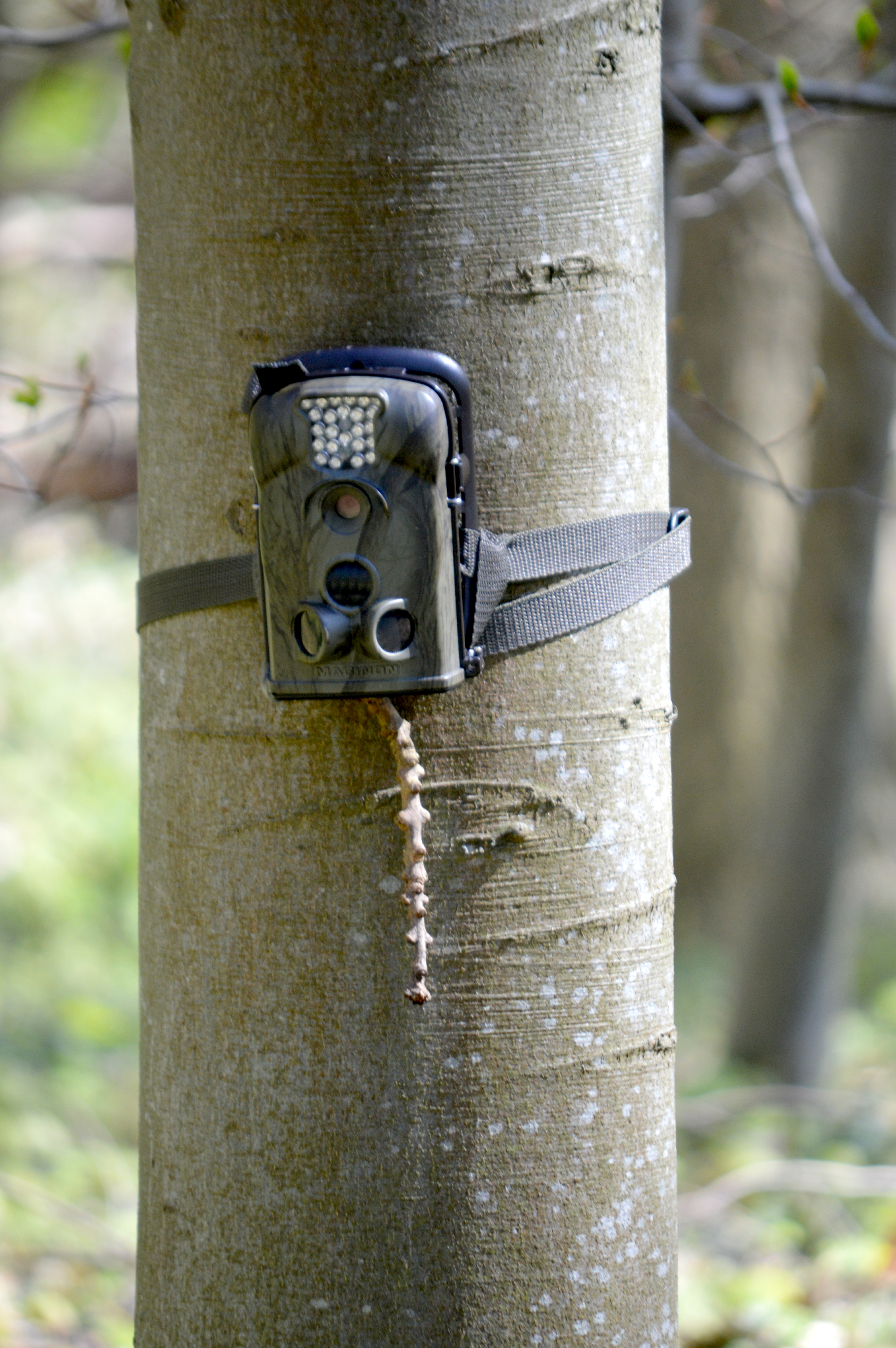 Landschaftsschutzgebiet Steinberg - Wildtierkamera (Kamerafalle)